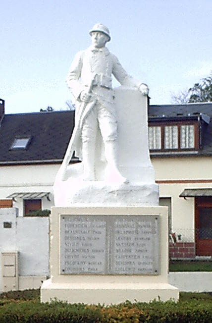 Monument aux morts pour la patrie.